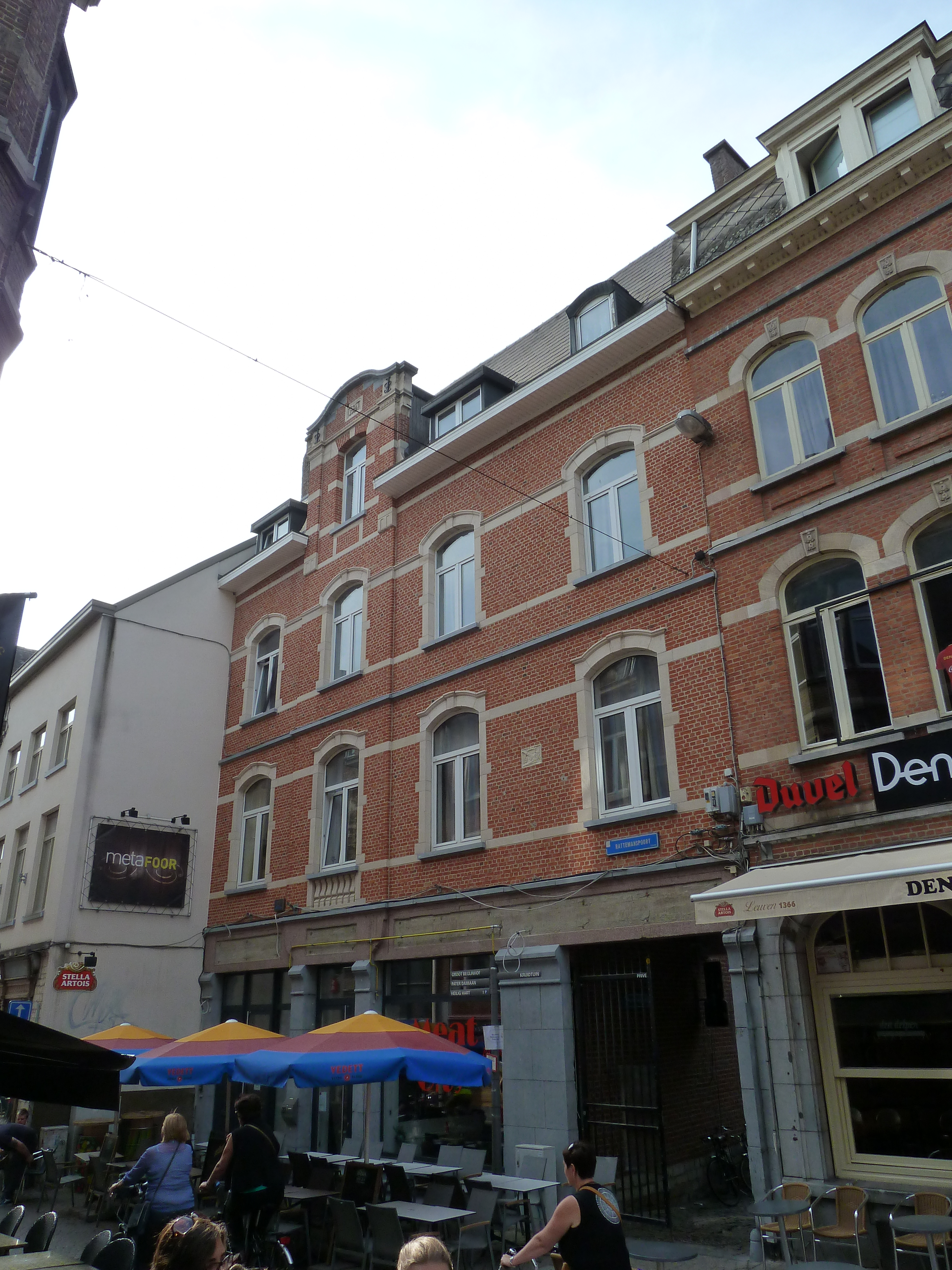 Parijsstraat 32, Leuven, België